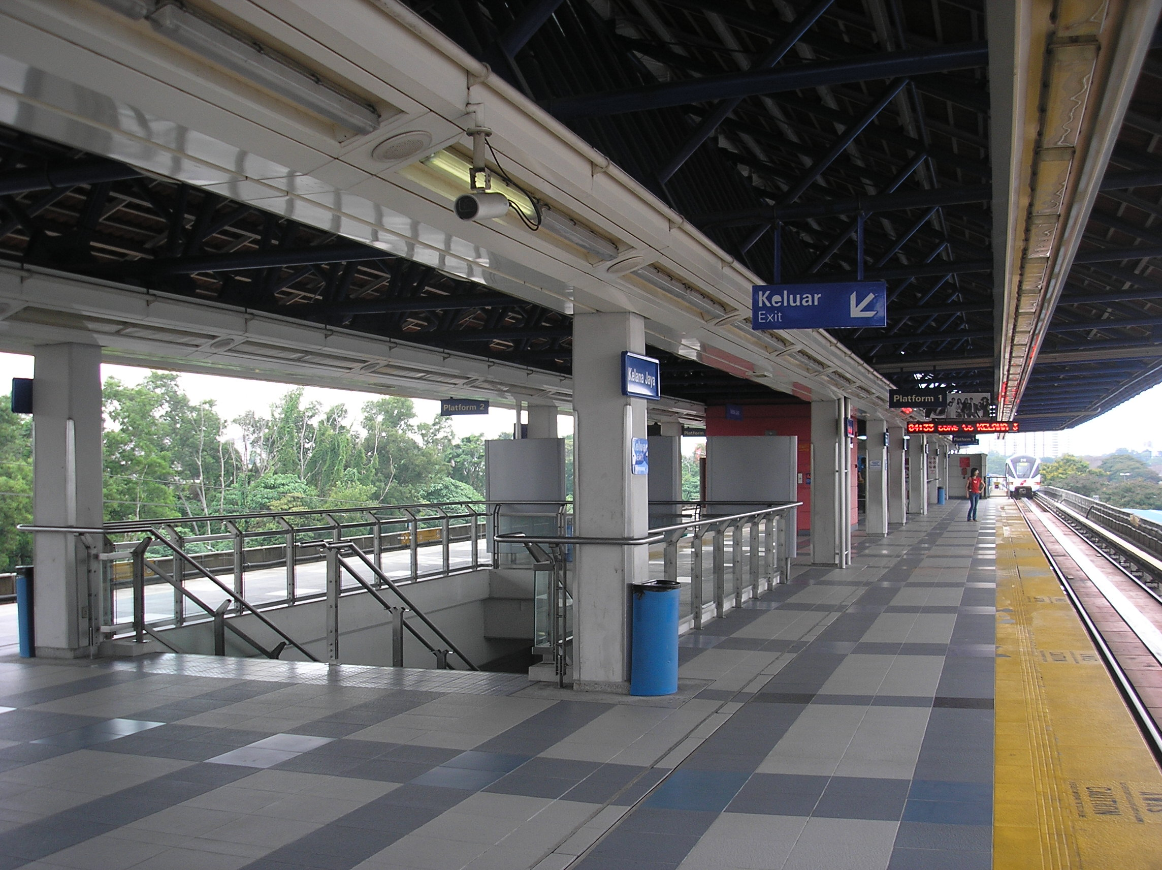 The Kelana Jaya LRT station (Kelana Jaya Line), Petaling Jaya, Selangor, Malaysia.